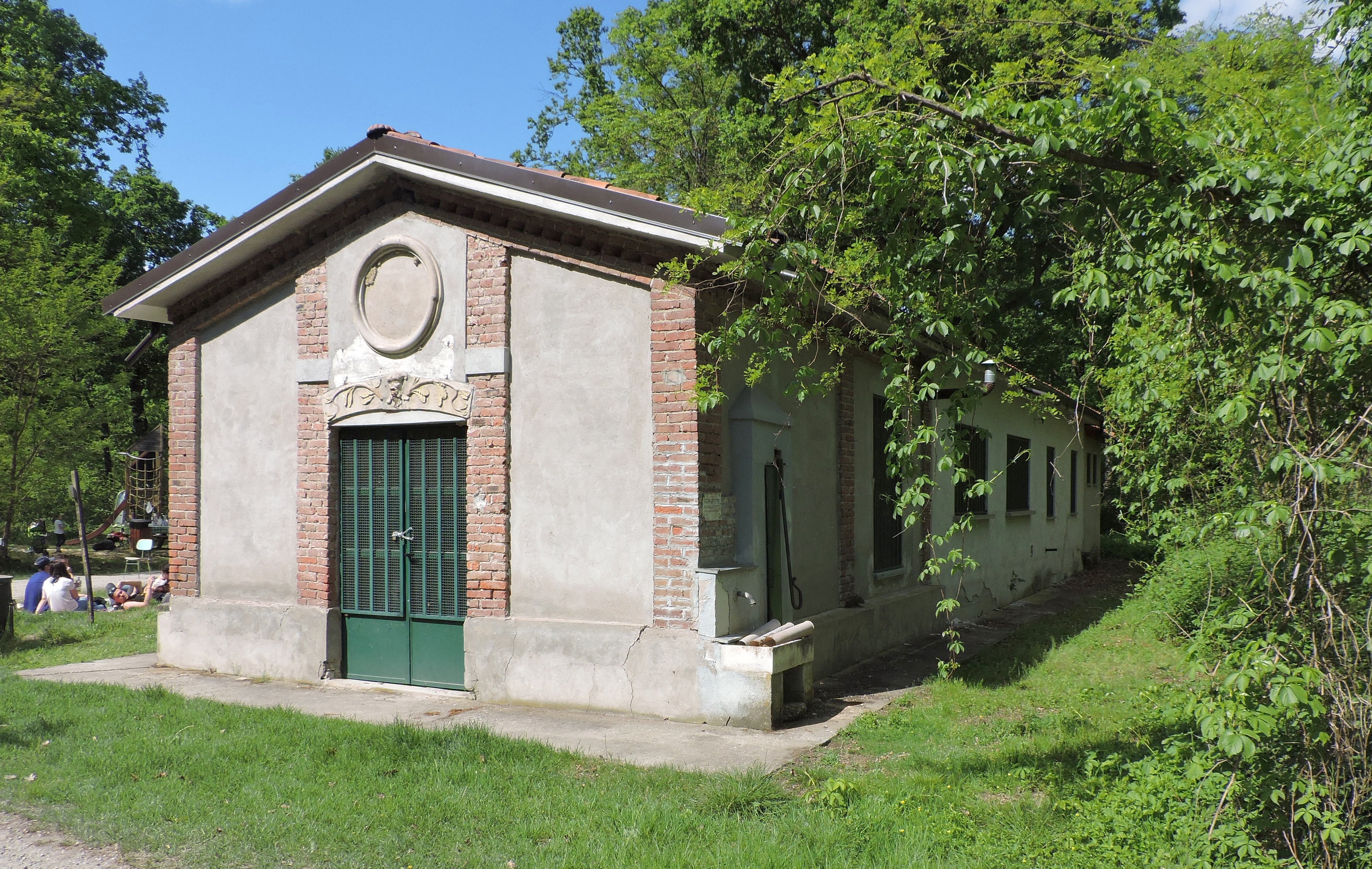 parco naturale del Bosco delle Sorti della Partecipanza di Trino (Q3895638)